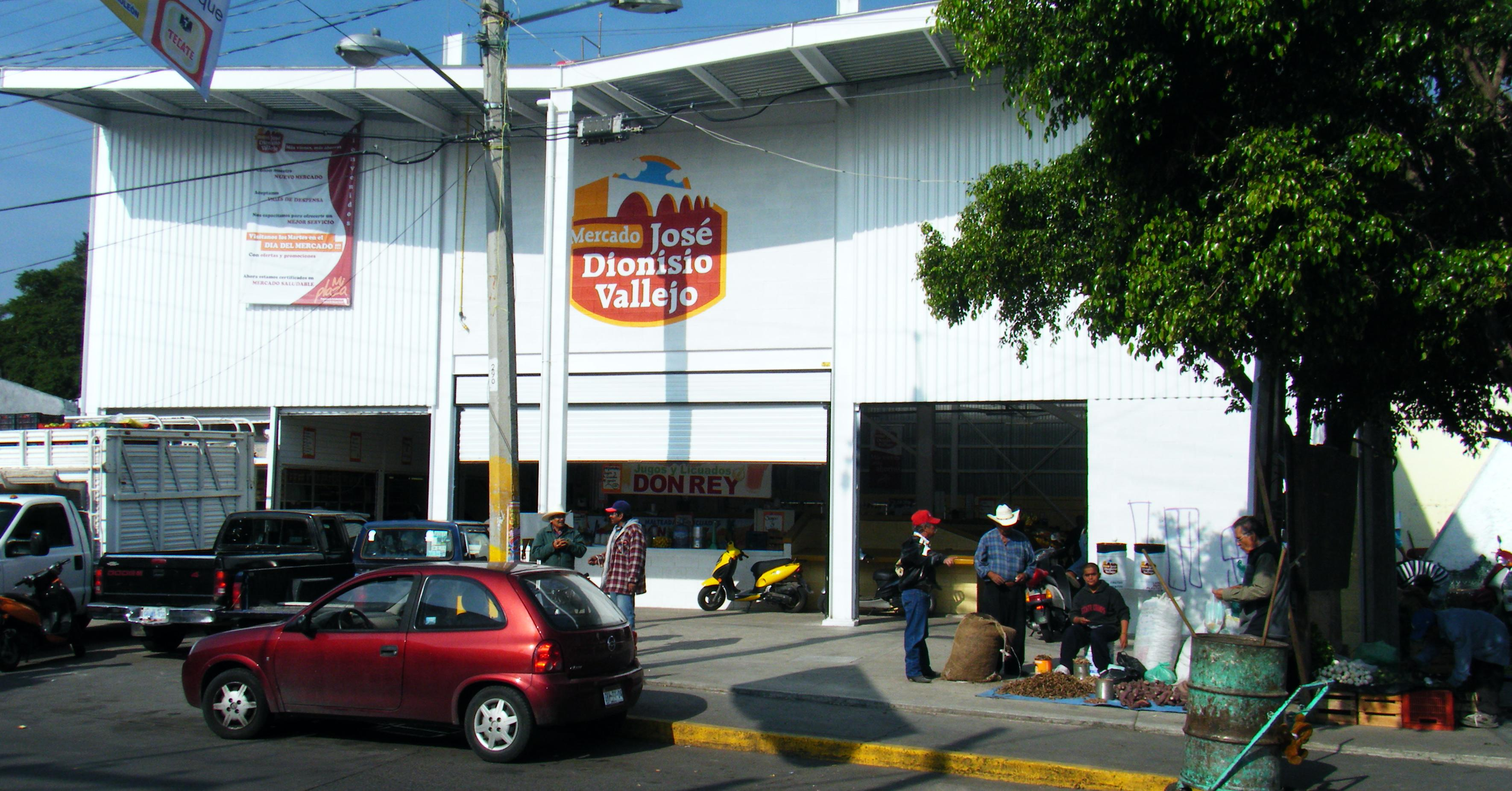 Mercado Jose Dionisio Vallejo Uriangato